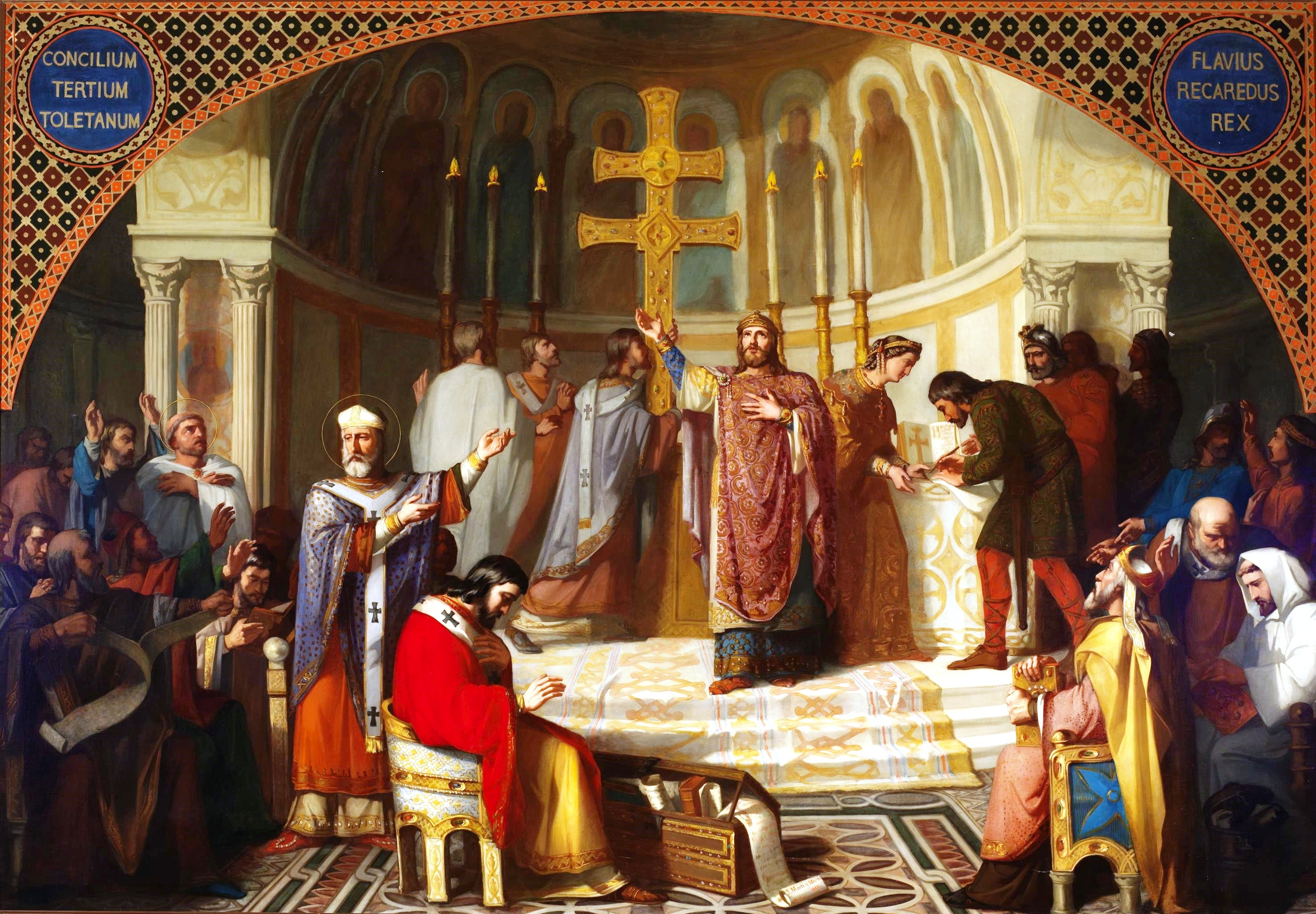 El lienzo representa el III Concilio de Toledo, celebrado en la ciudad de Toledo en el año 589, durante el reinado de Recaredo, quien abandonó el arrianismo y se convirtió al catolicismo.